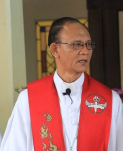 Pendeta Em. Dr. I nengah Ripa, M.Th.